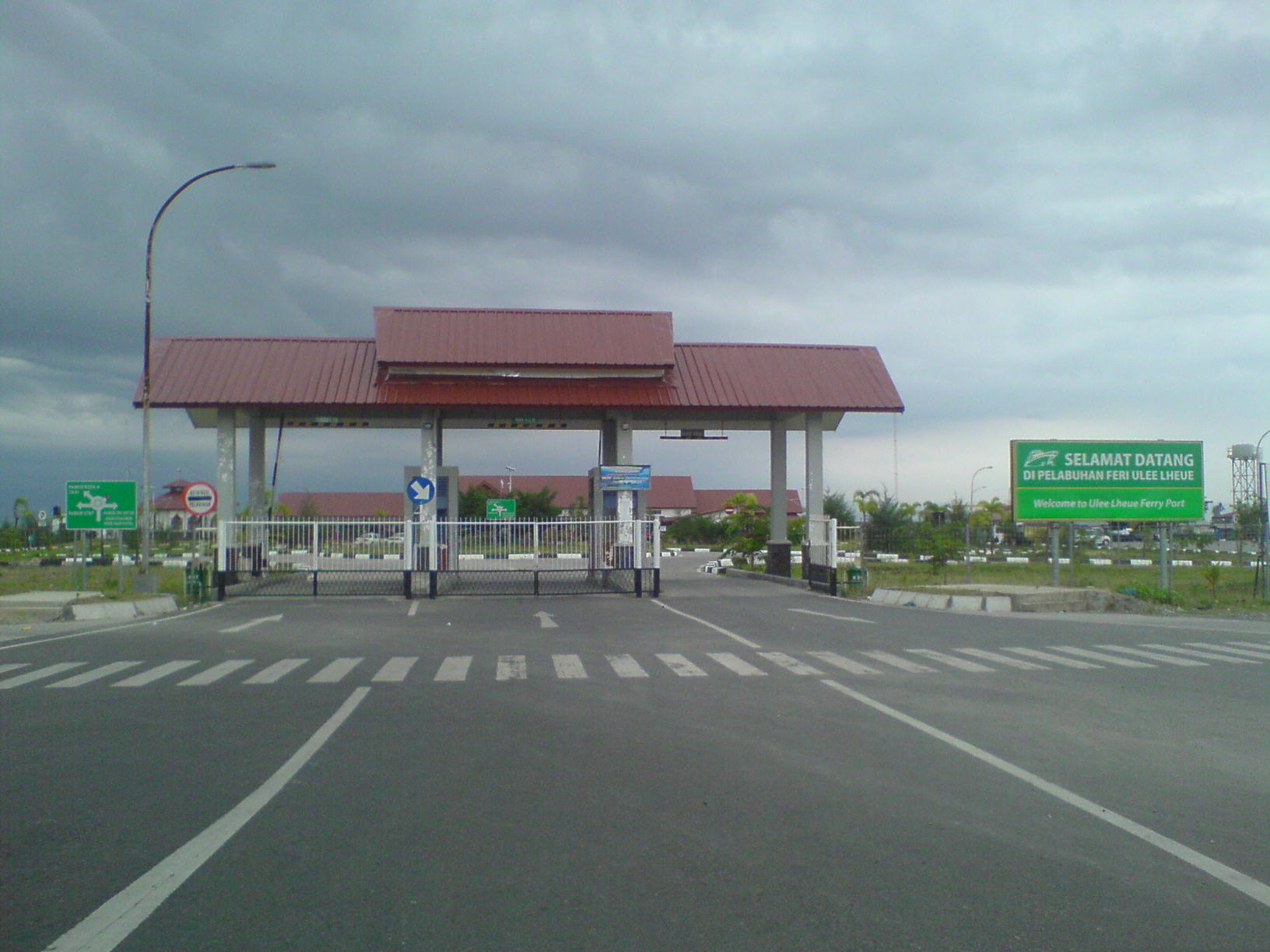 Pelabuhan Ulee Lheue, Banda Aceh